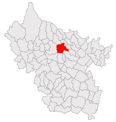 Categorie:Hărţi ale judeţului Buzău